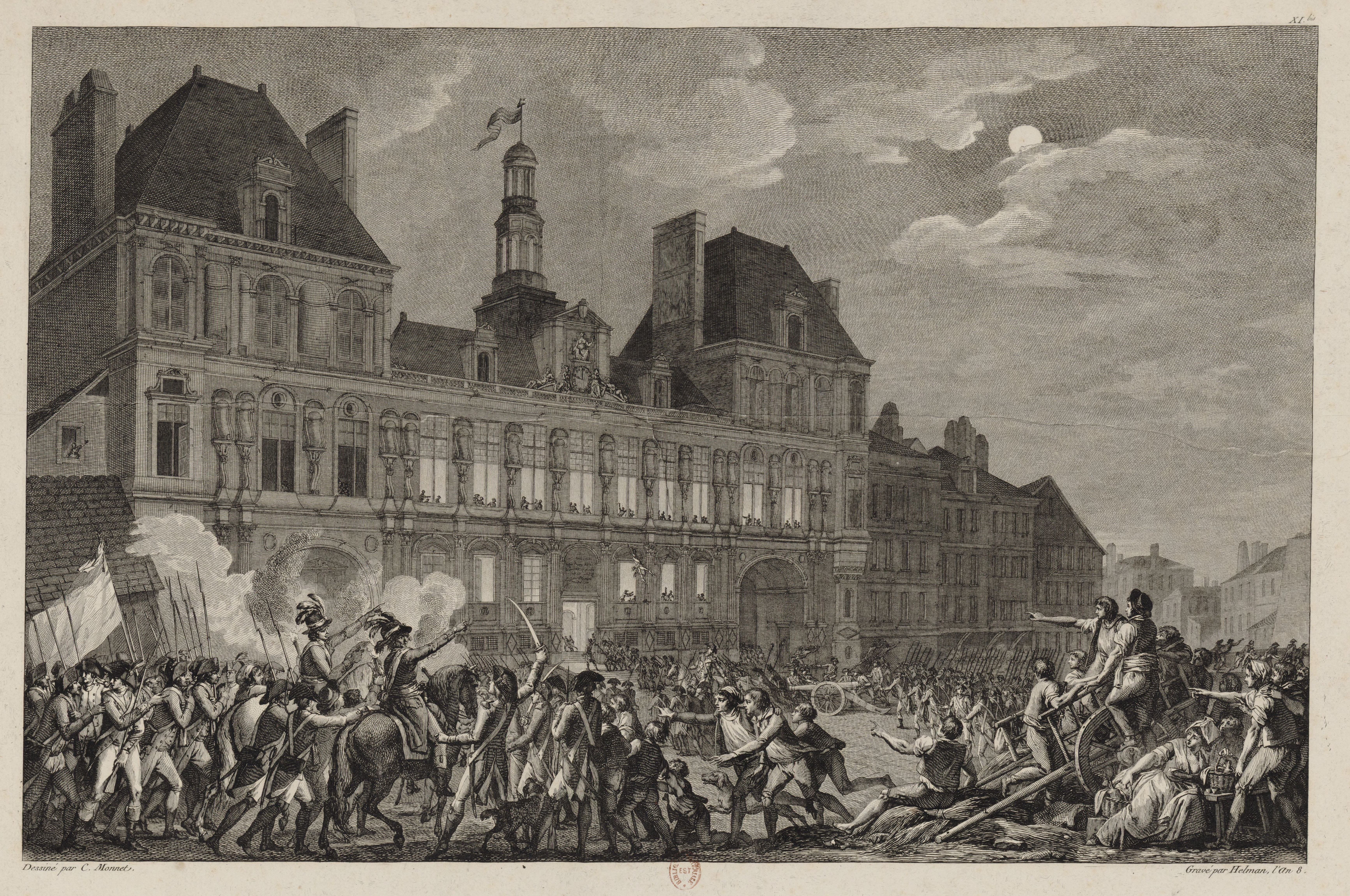 L'attaque de l'Hôtel-de-Ville par les troupes de la Convention, le 9 thermidor an II (26 juillet 1794). Dessin de Charles Monnet, gravé par Duplessis-Bertaux et Helman.